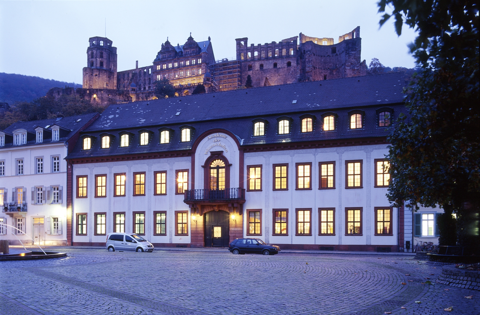 Heidelberger Akademie der Wissenschaften/Heidelberg Academy of Sciences and Humanities